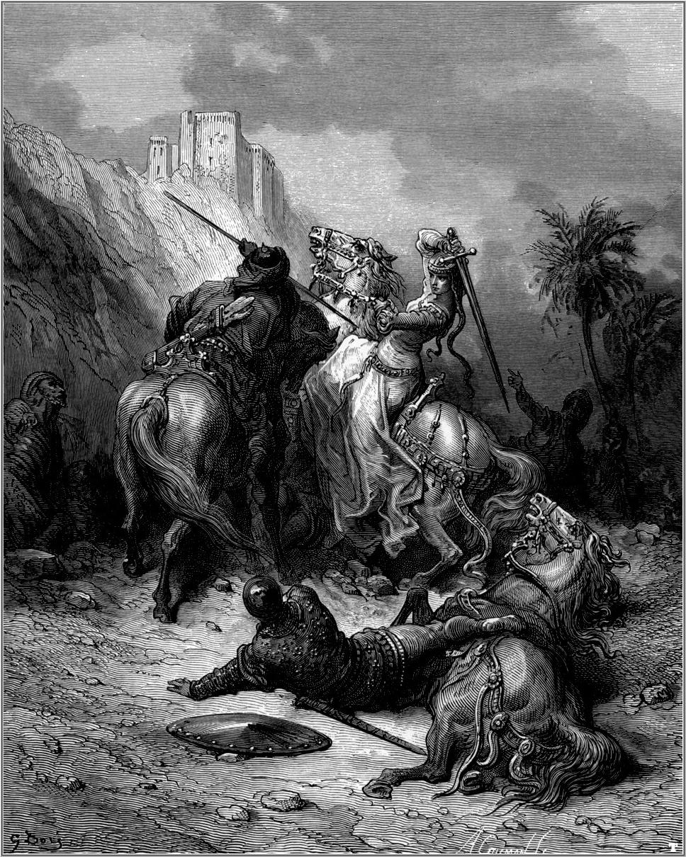 detail